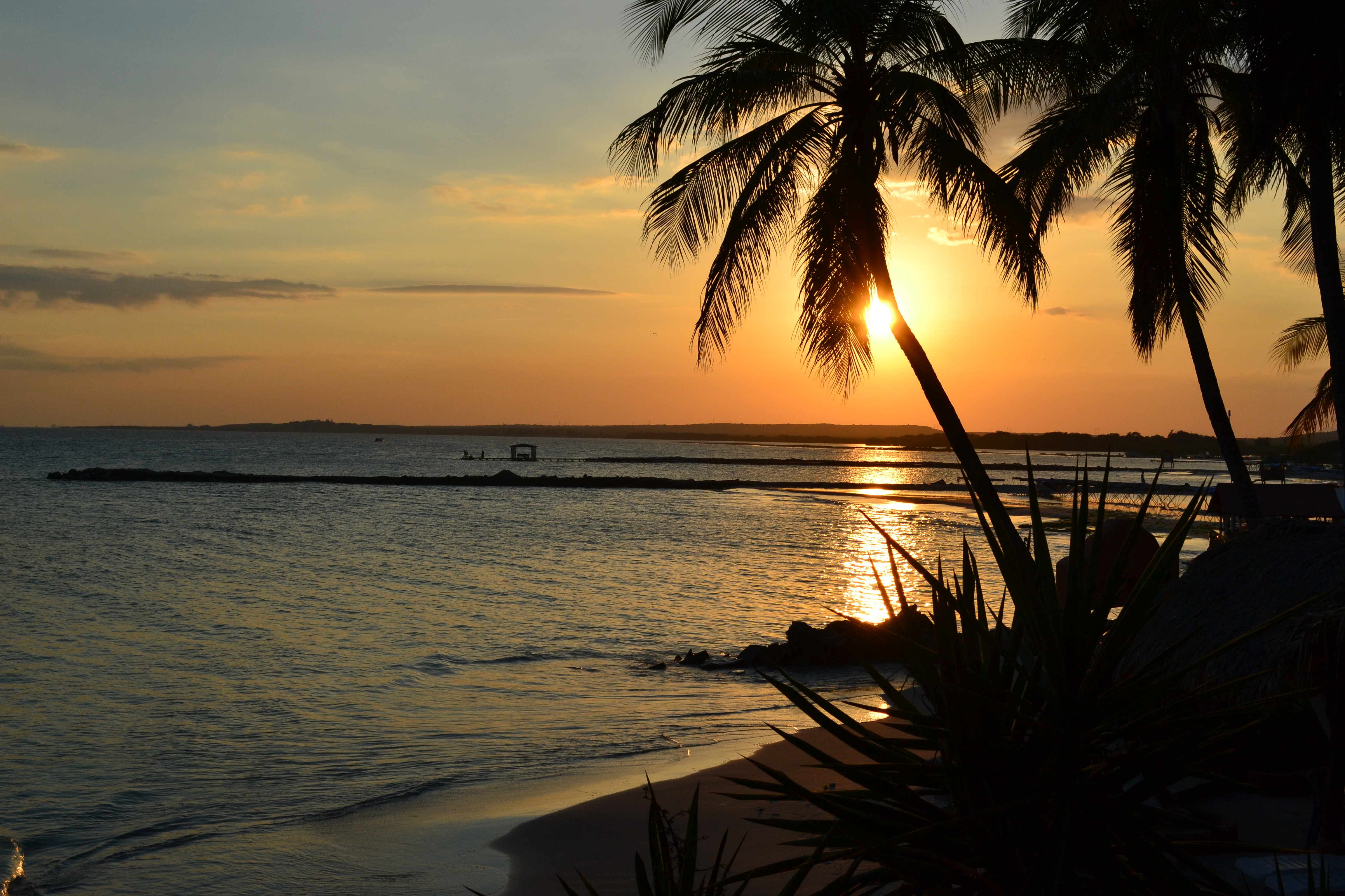 Atardecer desde el Yaque Venezuela